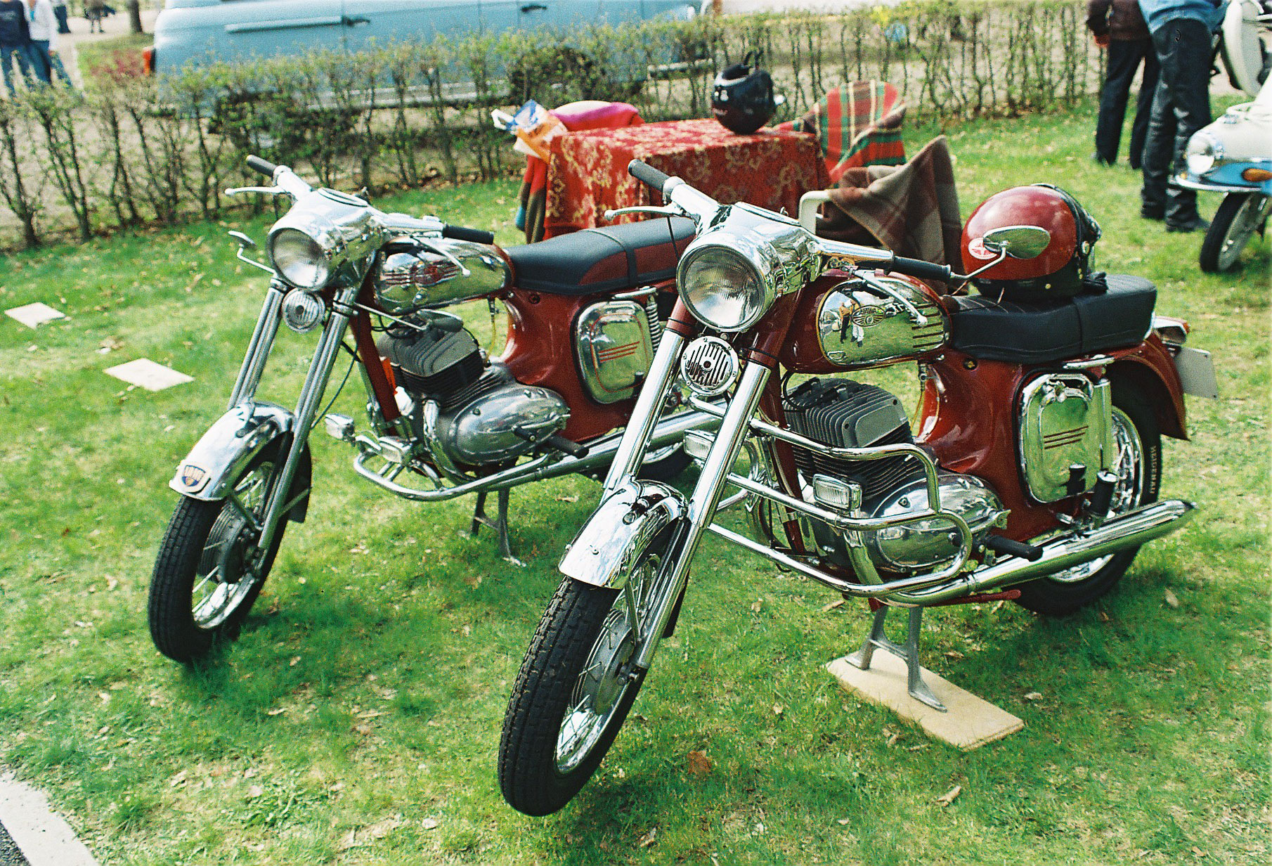 JAWA